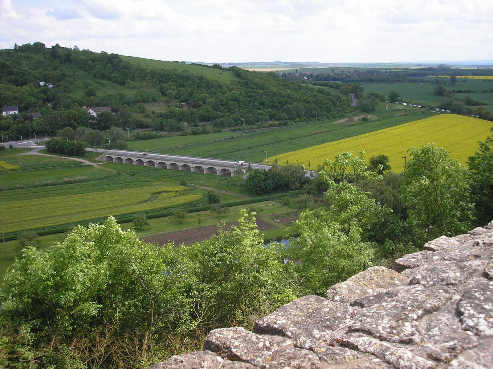 Die Unstrutbrücke in Sachsenburg (Thüringen), von der Unteren Sachsenburg aus gesehen (dahinter der Wächterberg).